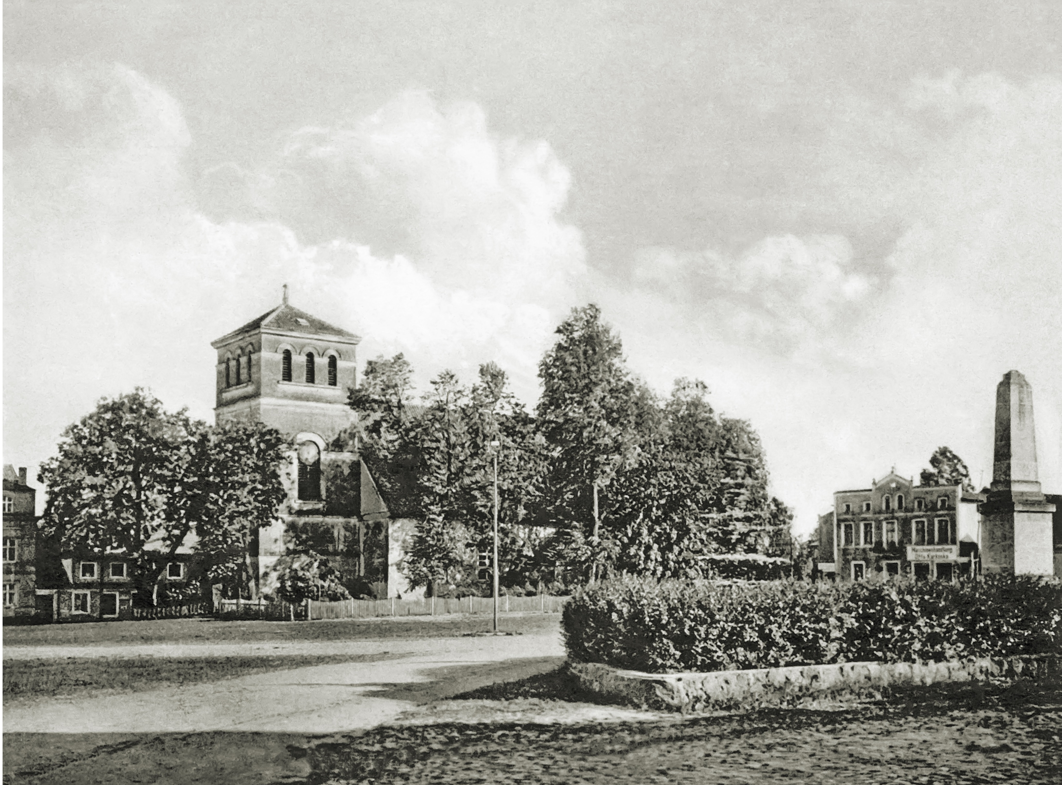 Kirche in Bialla / Gehlenburg, Masuren